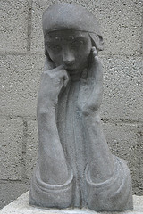 Meisjeskop gemaakt door de Nederlandse beeldhouwer Albert Termote (1889-1978). Het beeld is in het bezit van het Kröller Möller.